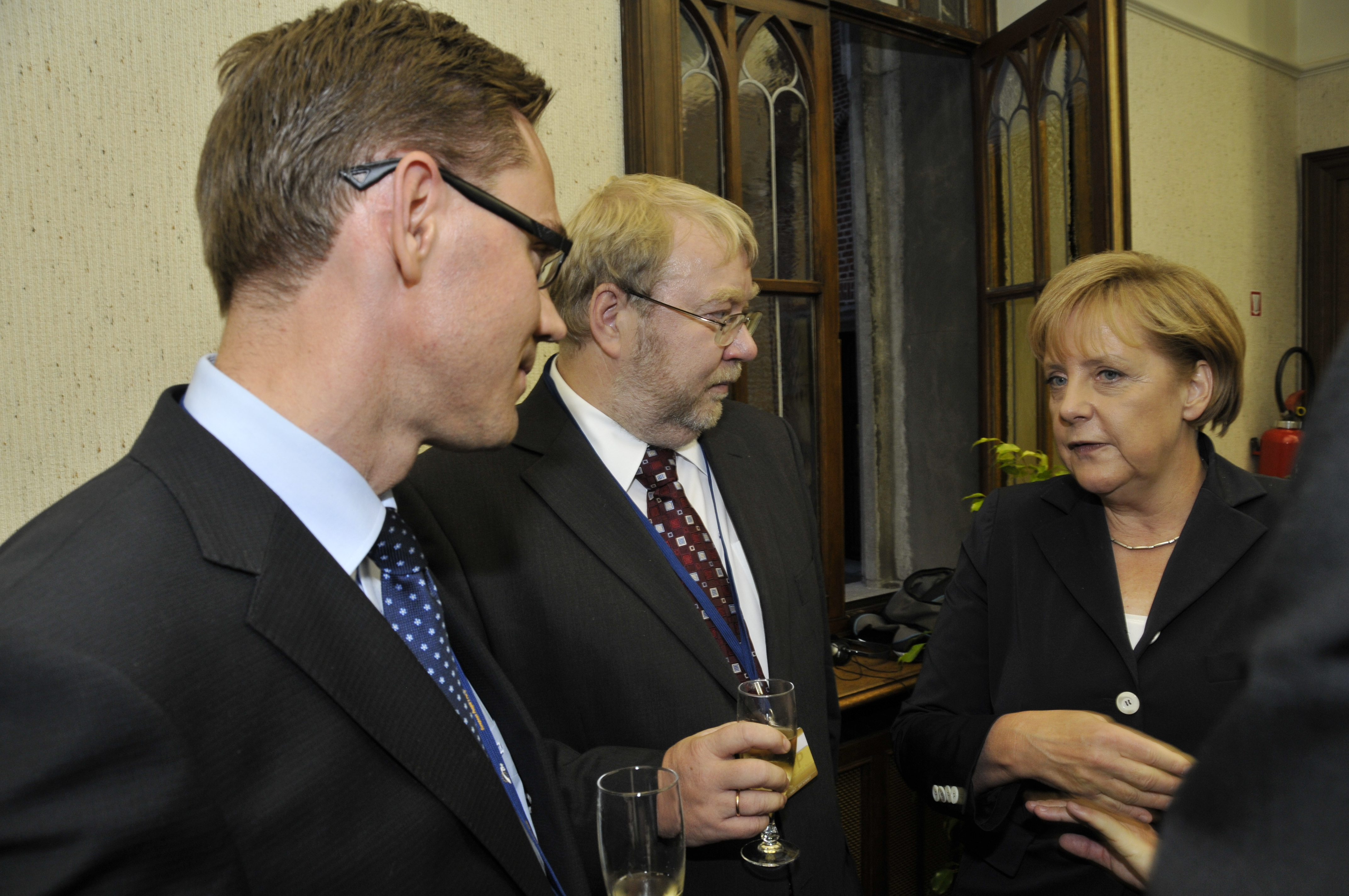 EPP Summit September 2010